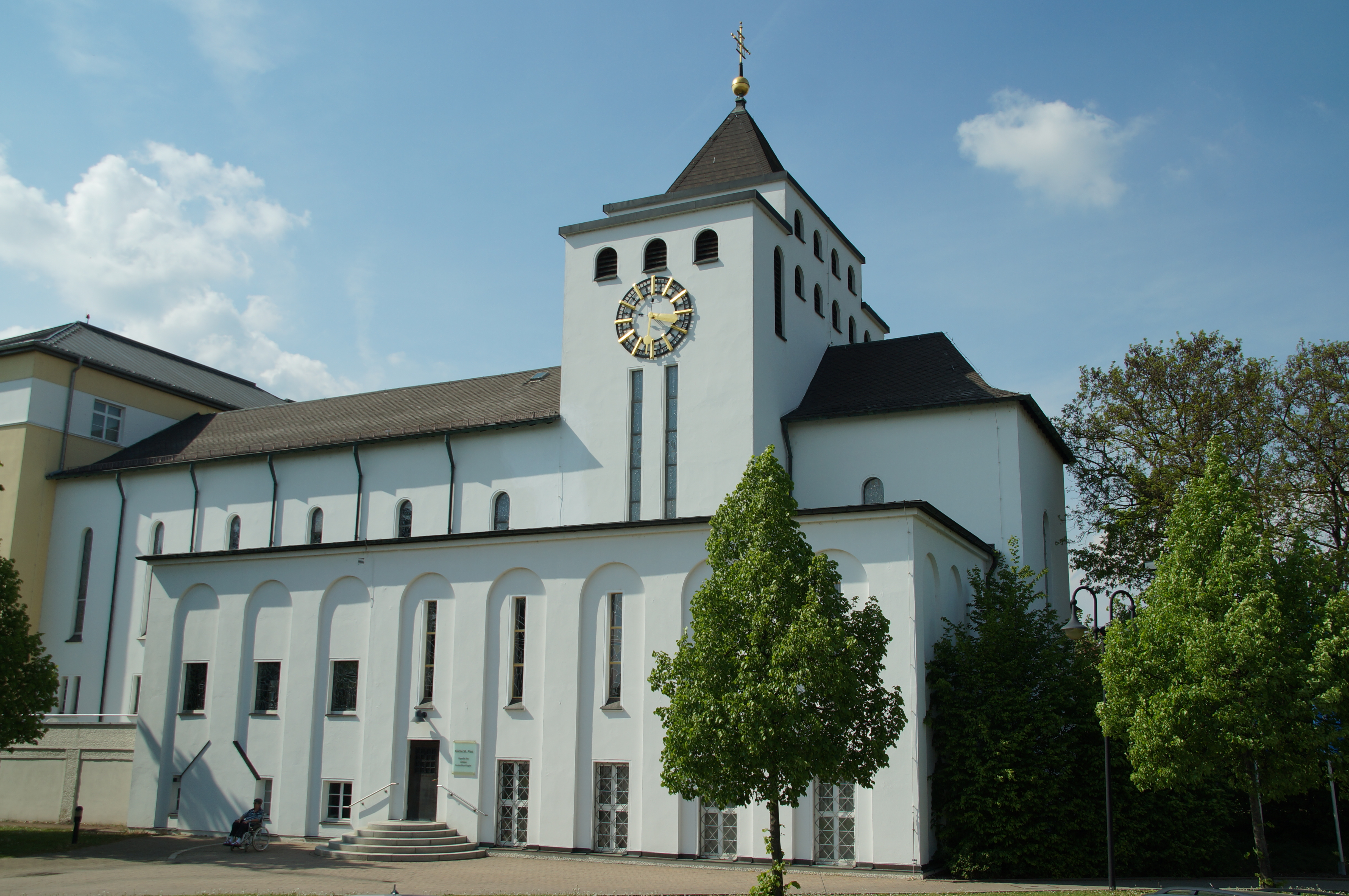 Krankenhauskirche Pius V., Saalbau mit riegelförmigem Chorturm und seitlichem Flachdachanbau, 1927/29 von Albert Boßlet; mit Ausstattung This is a photograph of an architectural monument.